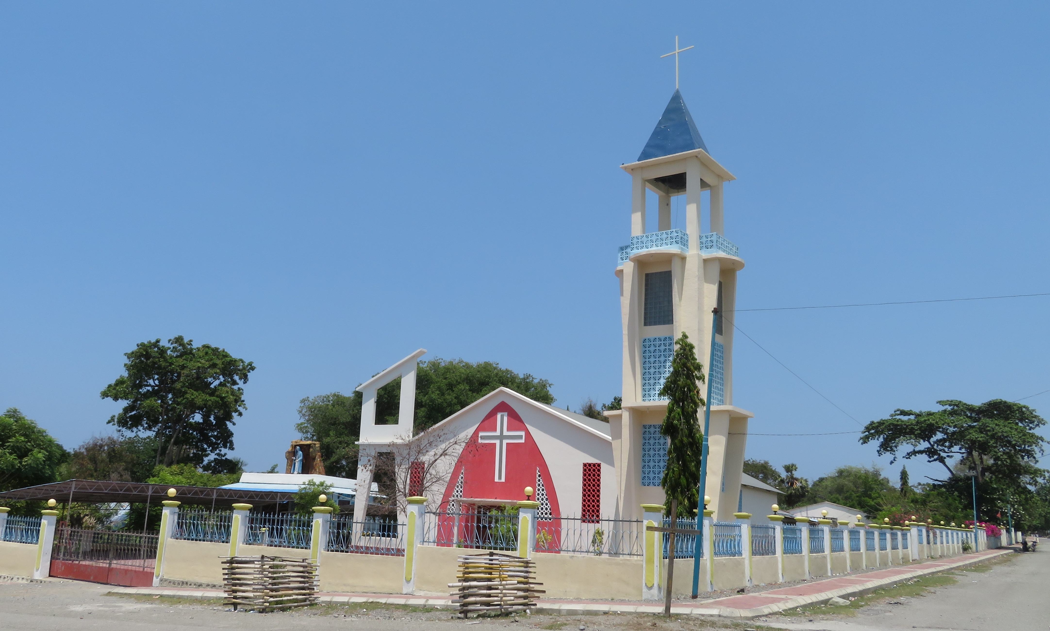 Pfarrkirche S. Joao de Brito, Liquiçá, Dato (Liquiçá), Osttimor